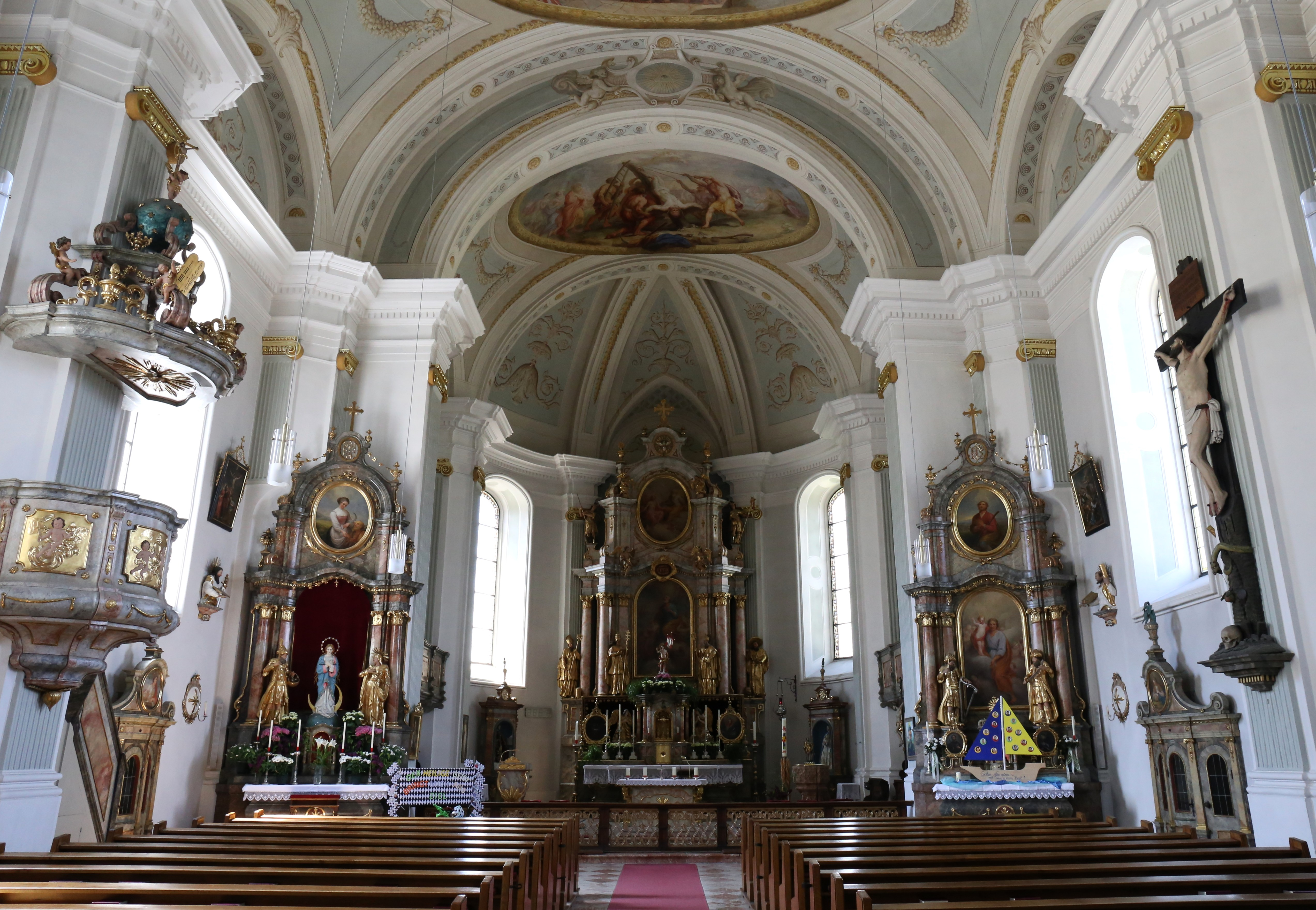 Kath. Pfarrkirche hl. Petrus, Reith im Alpbachtal; mächtiger klassizistischer Saalbau. Urkundlich Pfarre 1187. Kirchenneubau 1801 bis 1805 This media shows the remarkable cultural object in the Austrian state of Tyrol listed by the Tyrolean Art Cadastre with the ID 3503. (on tirisMaps, pdf, more images on Commons)